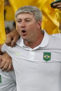 Odair Hellmann nos Jogos Olímpicos de 2016